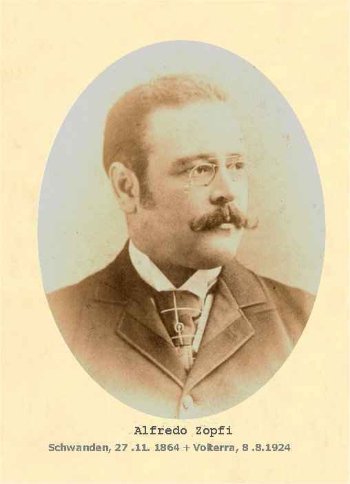 Ritratto di Alfredo Zopfi fotografia datata 1898